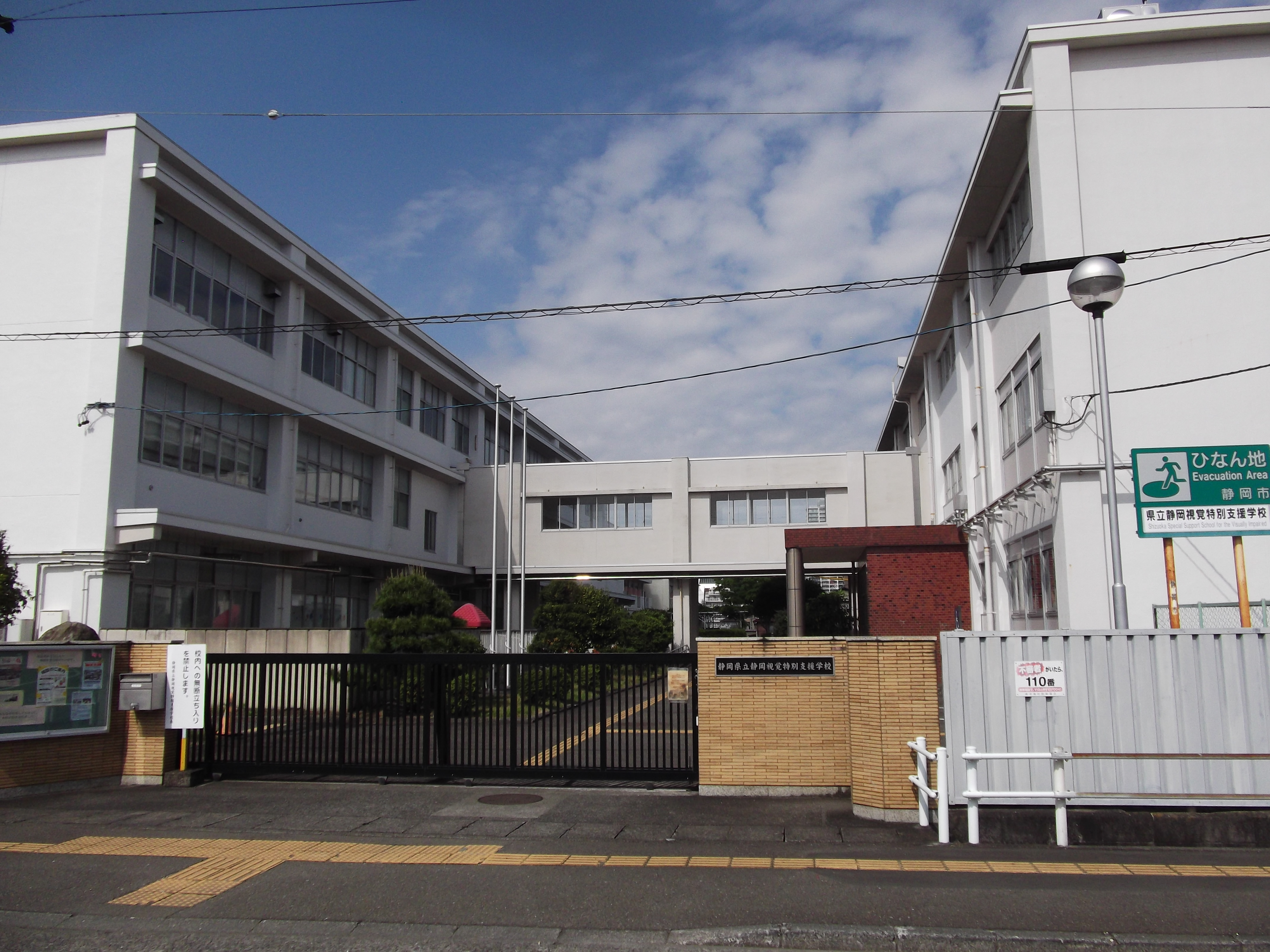 静岡県立静岡視覚特別支援学校